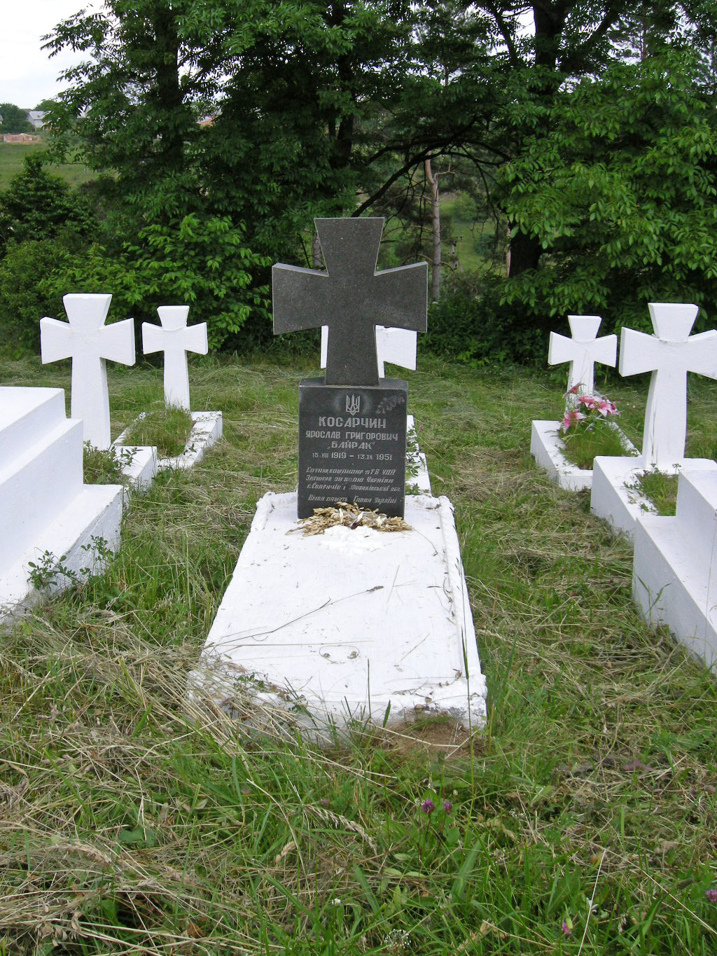 Могила Ярослава Косарчина на меморіалі могил Українських січових стрільців, воїнів Української галицької армії на нагірянському кладовищі в Бучачі.